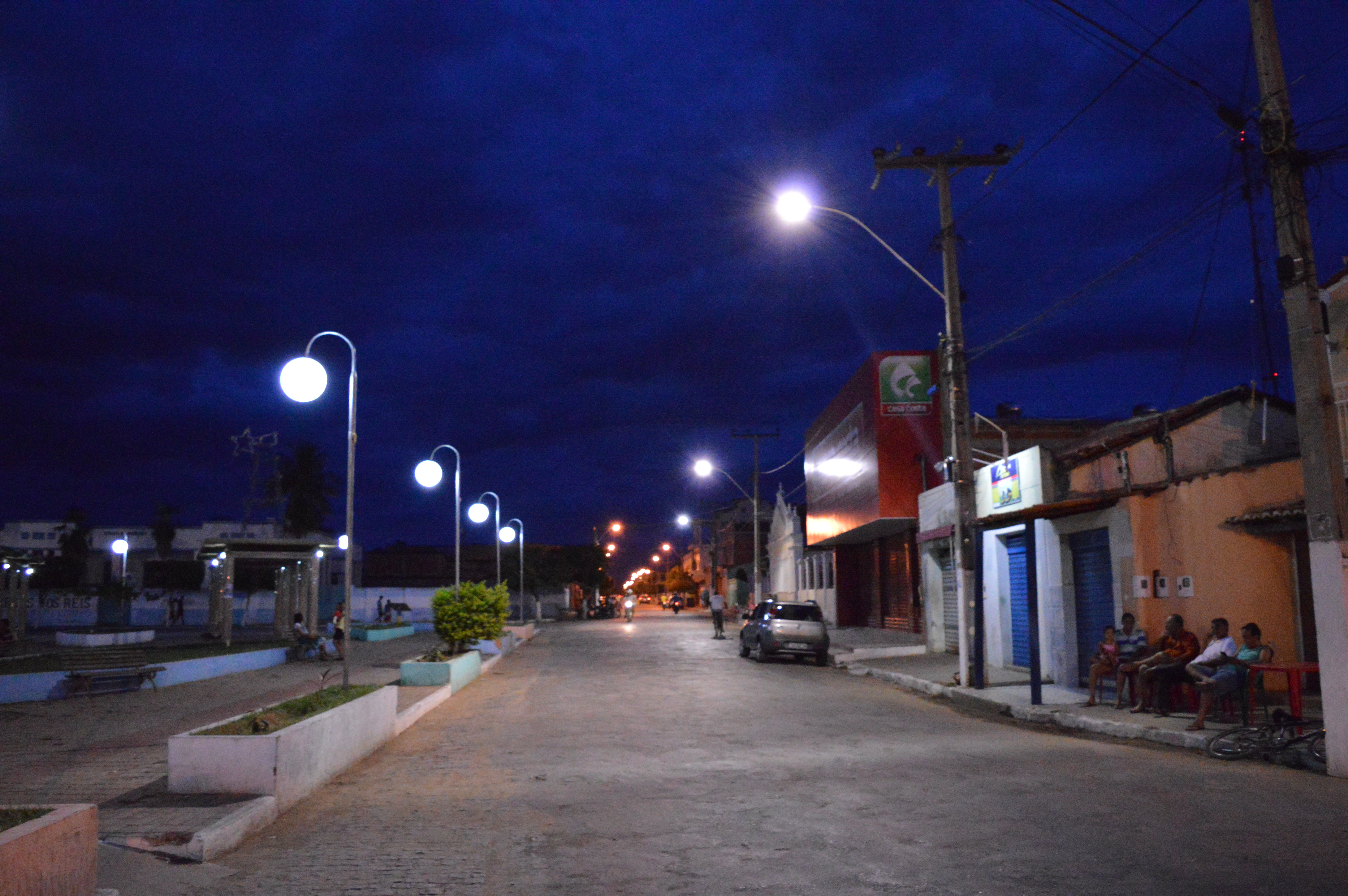 Vista da Praça Dois de Julho, principal praça da cidade brasileira de Paratinga.